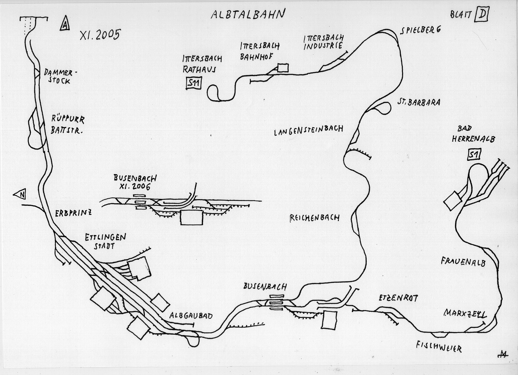 Stadtbahn Karlsruhe: Gleisplan bestehend aus 24 Blättern: Blattschnitt Blatt A: Karlsruhe Mitte Blatt B: Karlsruhe Nord/Nordwest, Hardtbahn Blatt C: Karlsruhe West, Wörth, Rheinbahn Blatt D: Albtalbahn Blatt E: Karlsruhe Ost Blatt F: Karlsruhe Nord/Nordost Blatt G: Bruchsal, Kraichtalbahn, Katzbachbahn Blatt H: Kraichgaubahn West Blatt HA: Kraichgaubahn Mitte Blatt HB: Kraichgaubahn Ost Blatt HC: Heilbronn Blatt HD: Hohenlohebahn Blatt I: Pfinztalbahn Blatt J: Enztalbahn Blatt K: Mühlacker, Vaihihgen (Enz) Blatt L: Vaihingen (Enz), Bietigheim-Bissingen Blatt M: Karlsruhe Hauptbahnhof Blatt N: Rheintalbahn Nord Blatt O: Rheintalbahn Süd Blatt P: Murgtalbahn Nord Blatt Q: Murgtalbahn Mitte Blatt R: Murgtalbahn Süd Blatt S: Gäubahn